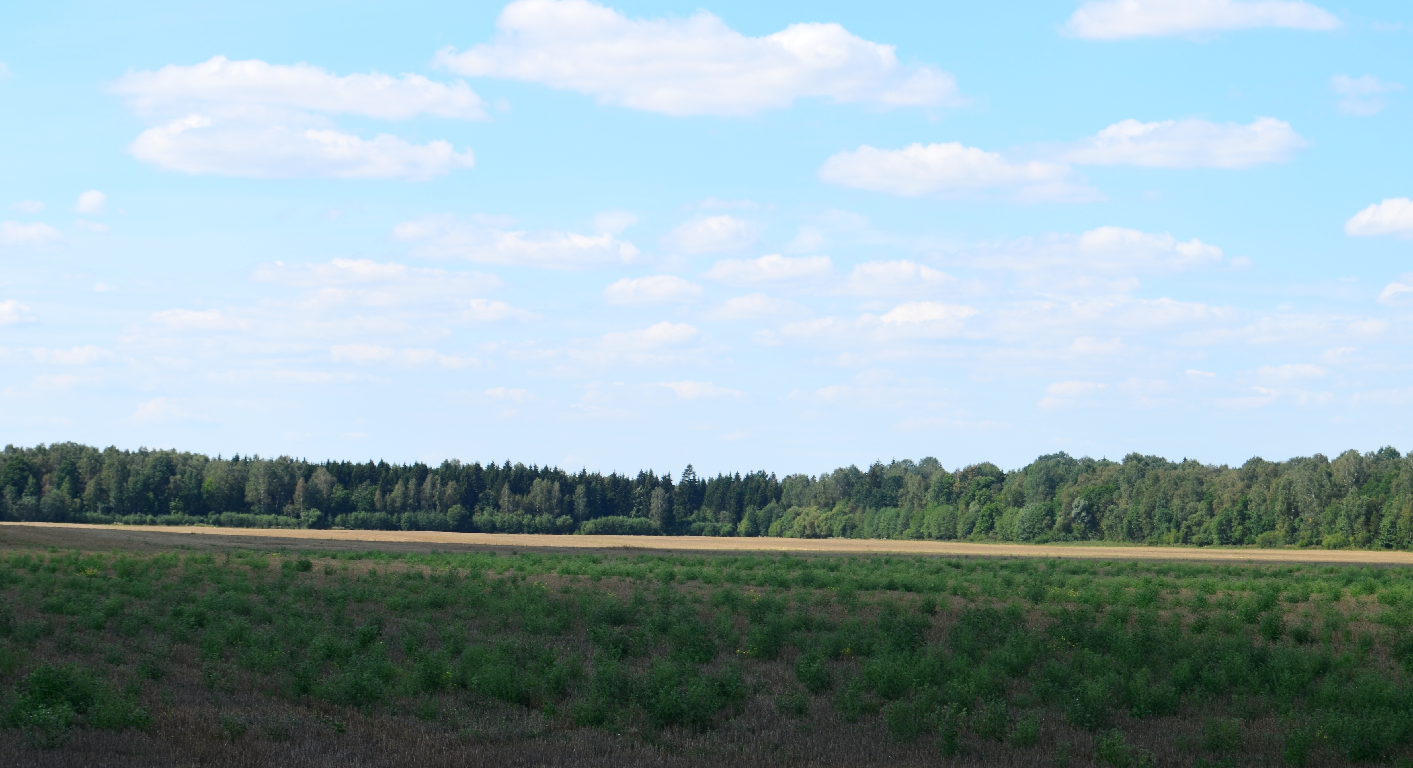 Lapkalnio miškai ties Užvarčiais, Kėdainių raj.